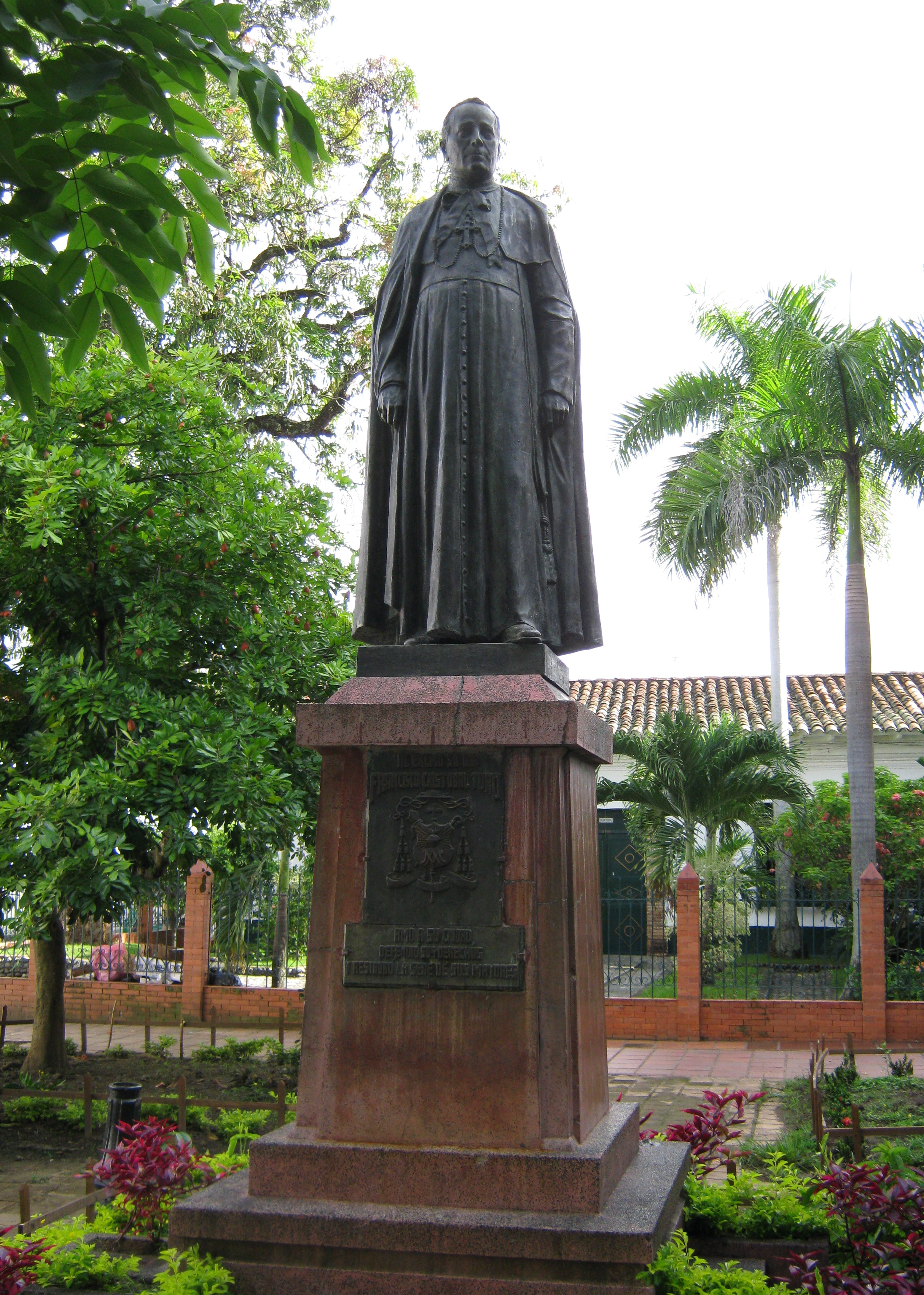 Estatua de monseñor Francisco Cristóbal Toro Correa, fue un obispo colombiano de la Iglesia Católica Romana.